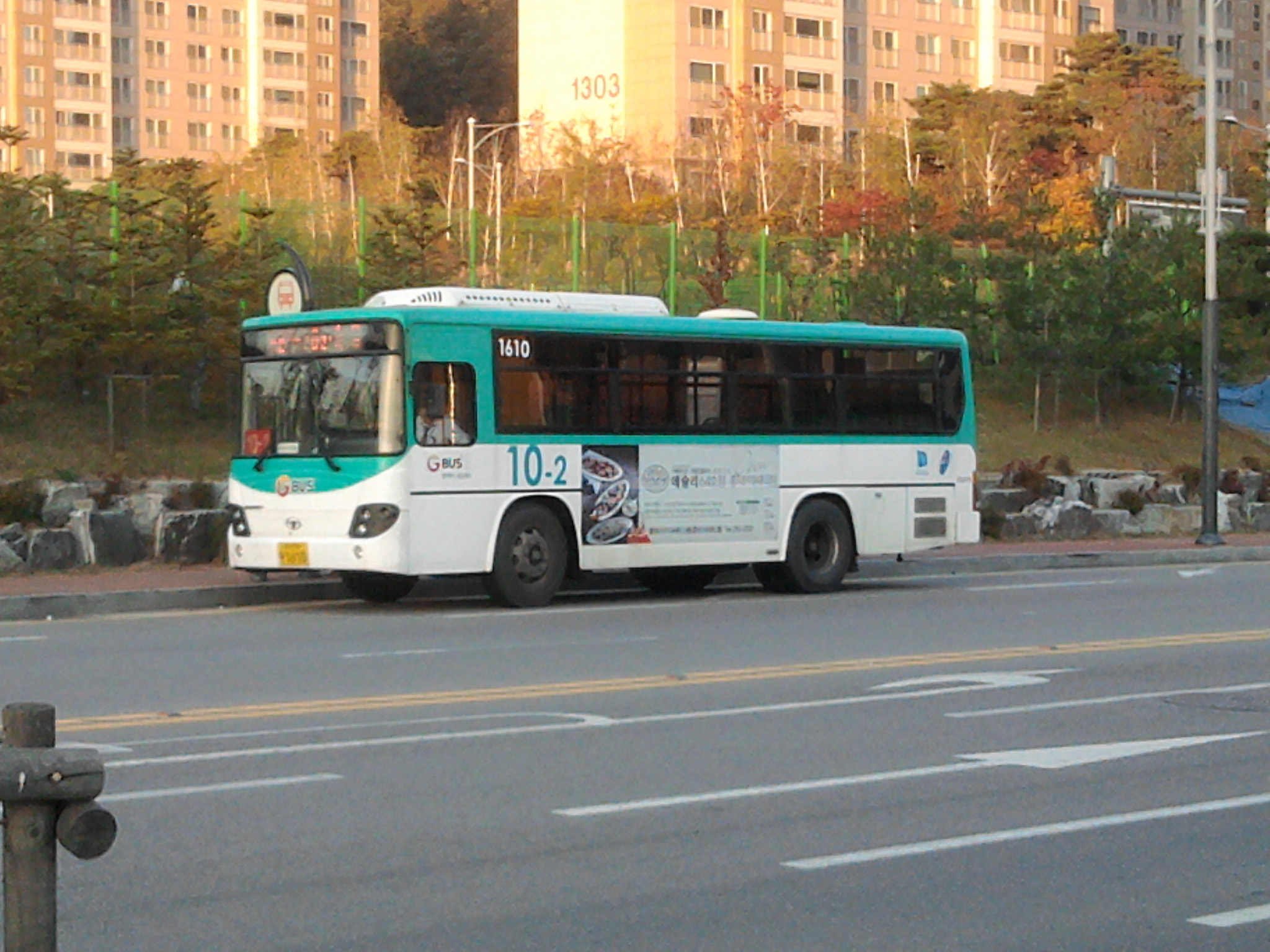 경남여객 소속 용인시내버스 10-2번